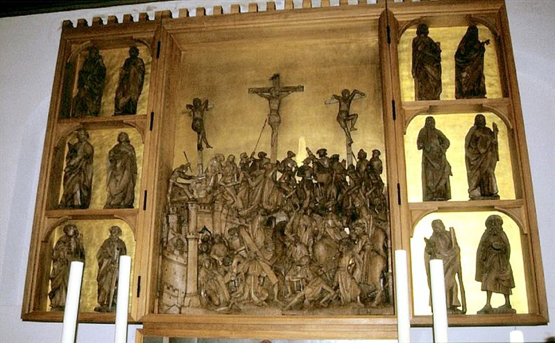 Leck Kirke i Sydslesvig. Altertavle